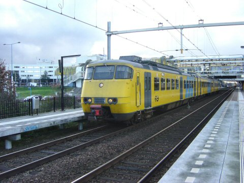 Sprinter op station Zoetermeer. Eigen foto, december 2004 Categorie:Afbeelding Stadsgewestelijk materieel